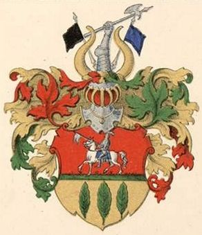 Kräftingi suguvõsa aadlivapp.